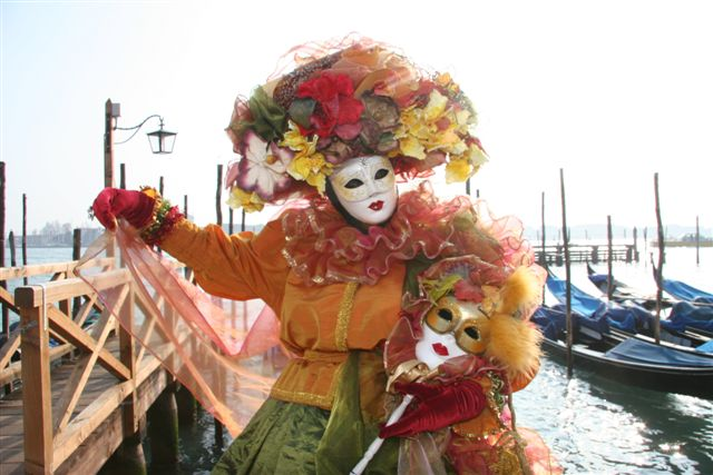 Maschere al Carnevale di Venezia 2008